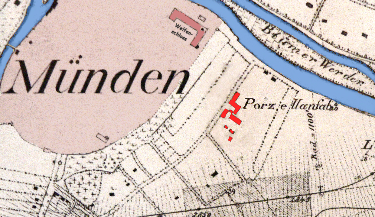 Stadtplan von Münden um 1850 mit Standort der Fayencefabrik, als Porzellan-Manufaktur bezeichnet, nachträglich koloriert